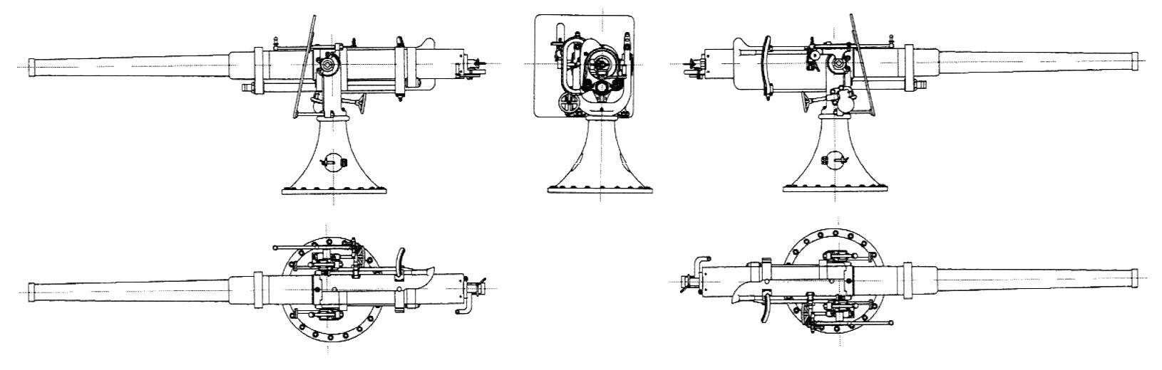 Создано по материалам архивов РГАВМФ (Ф. 421, Оп.12) и фондов музея ГОЗ